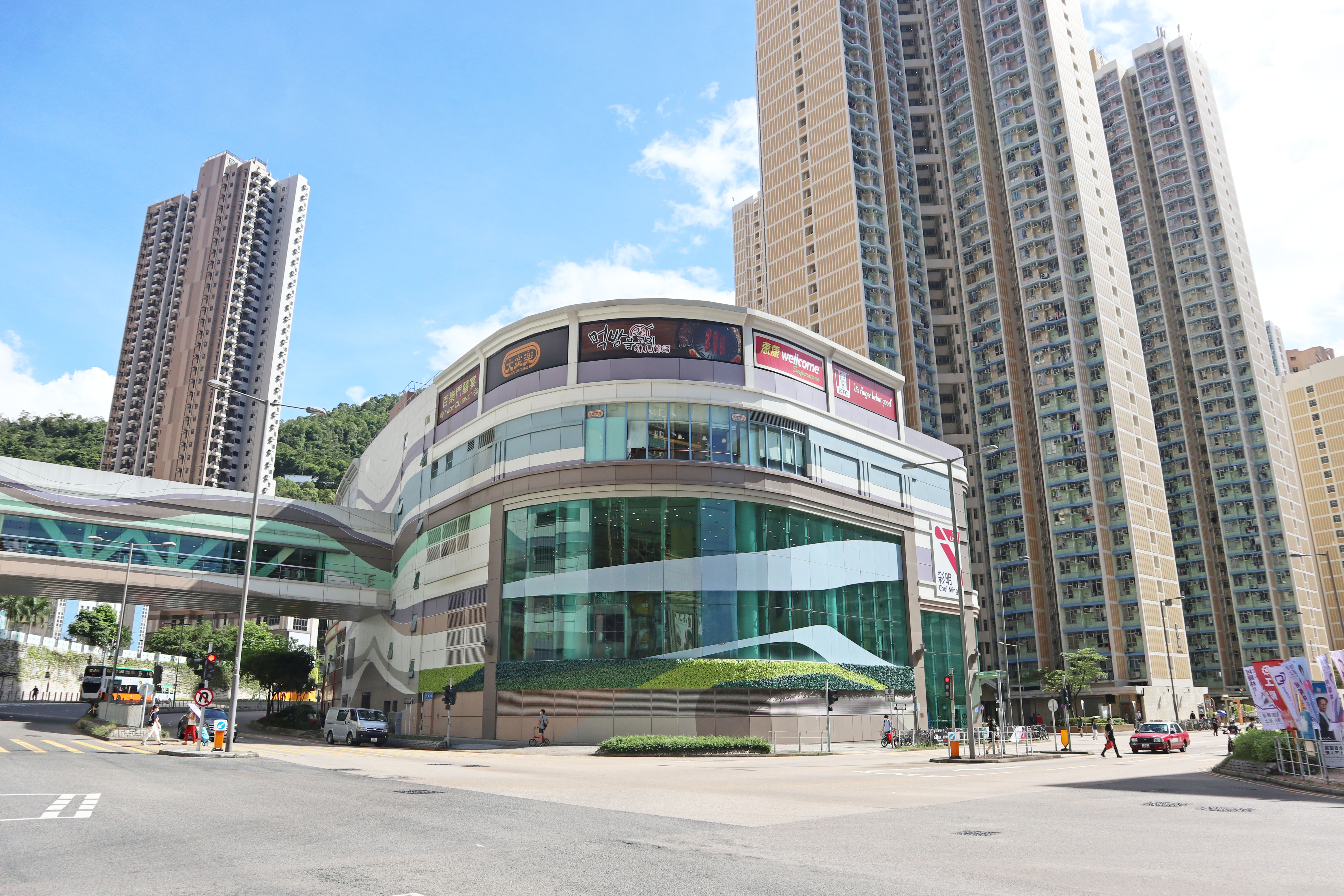 調景嶺彩明商場一期新貌